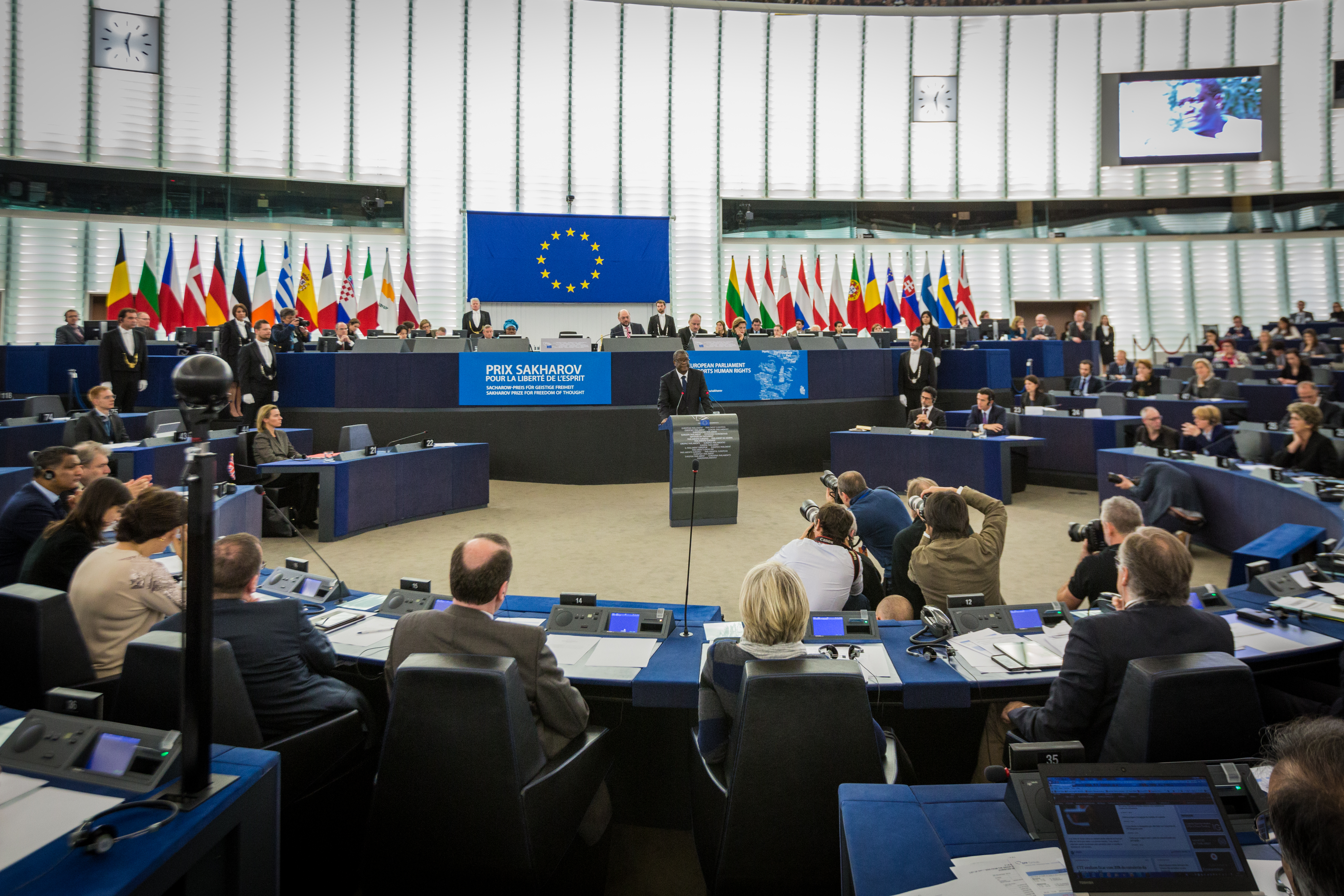 Remise du prix Sakharov 2014 à Denis Mukwege au Parlement européen, Strasbourg 26 novembre 2014